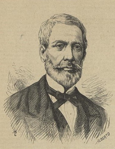 Visconde de Santa Thereza, General Polidoro (brazileiro) (Fallecido em 13 de janeiro de 1879 — segundo uma photographia).